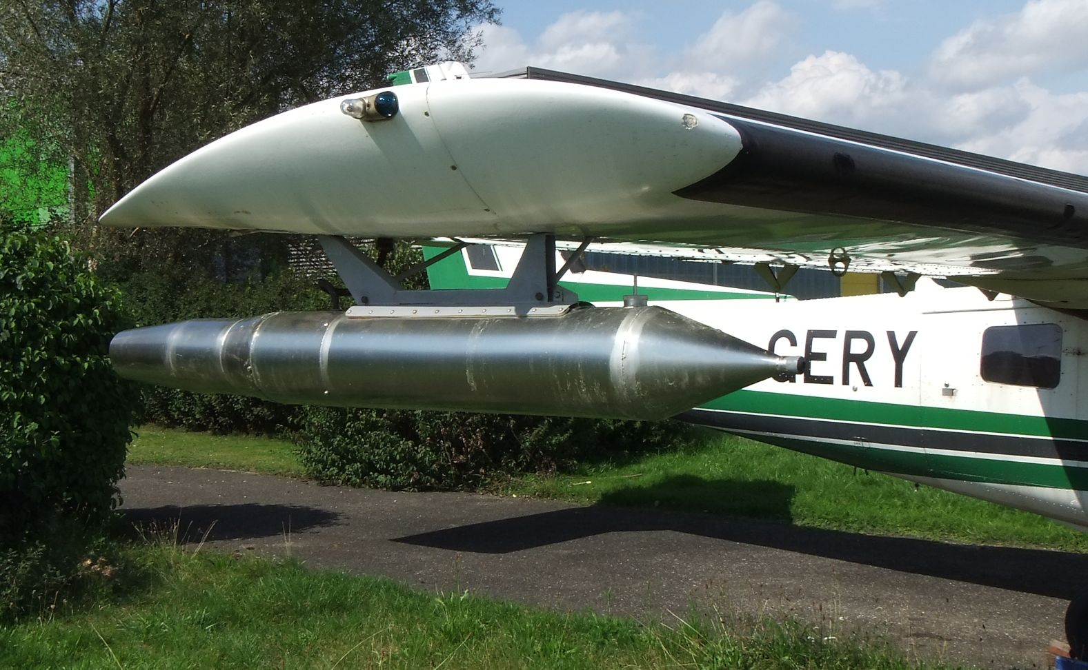 Silberiodid-Generator des Hagelfliegers in Donaueschingen EDTD